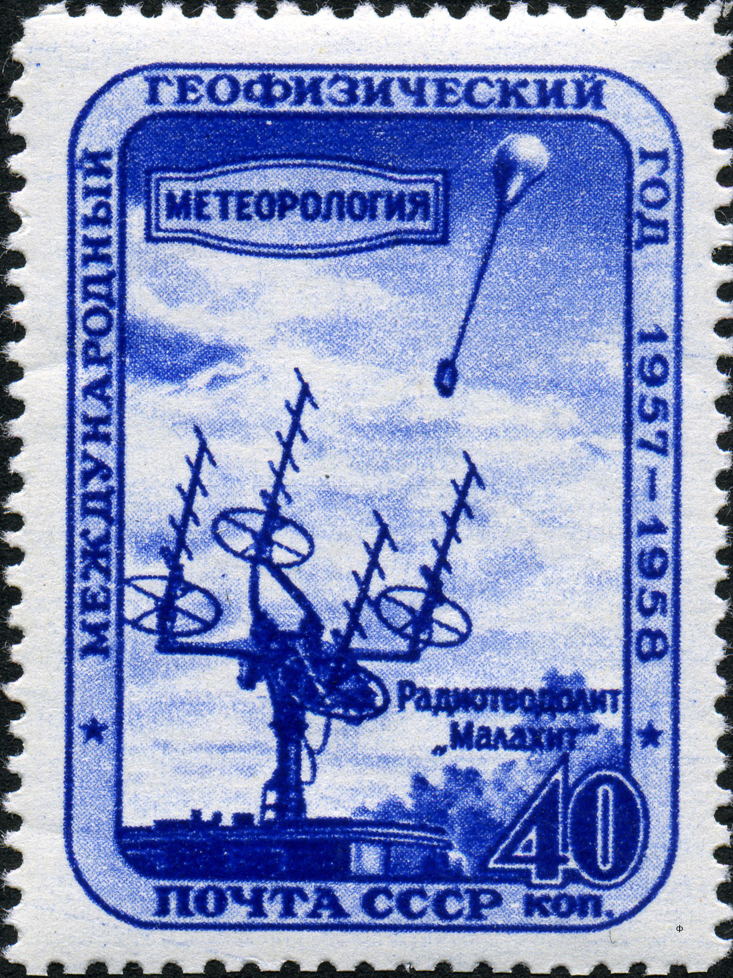 Марка СССР